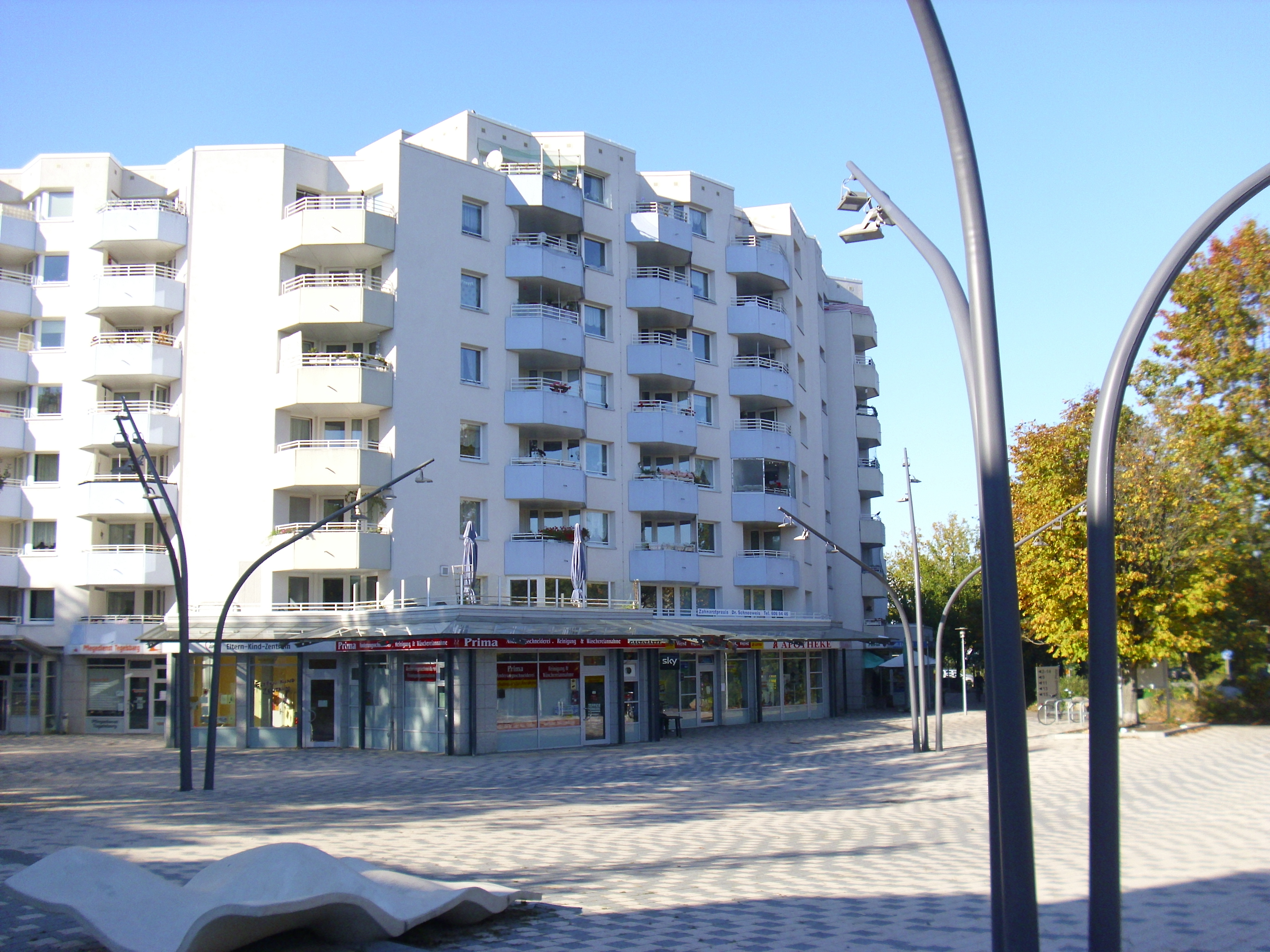 Norbert-Schmid-Platz am Tegelsbarg in Hamburg-Hummelsbüttel. Benannt nach Norbert Schmid, dem ersten Terroropfer der Rote Armee Fraktion